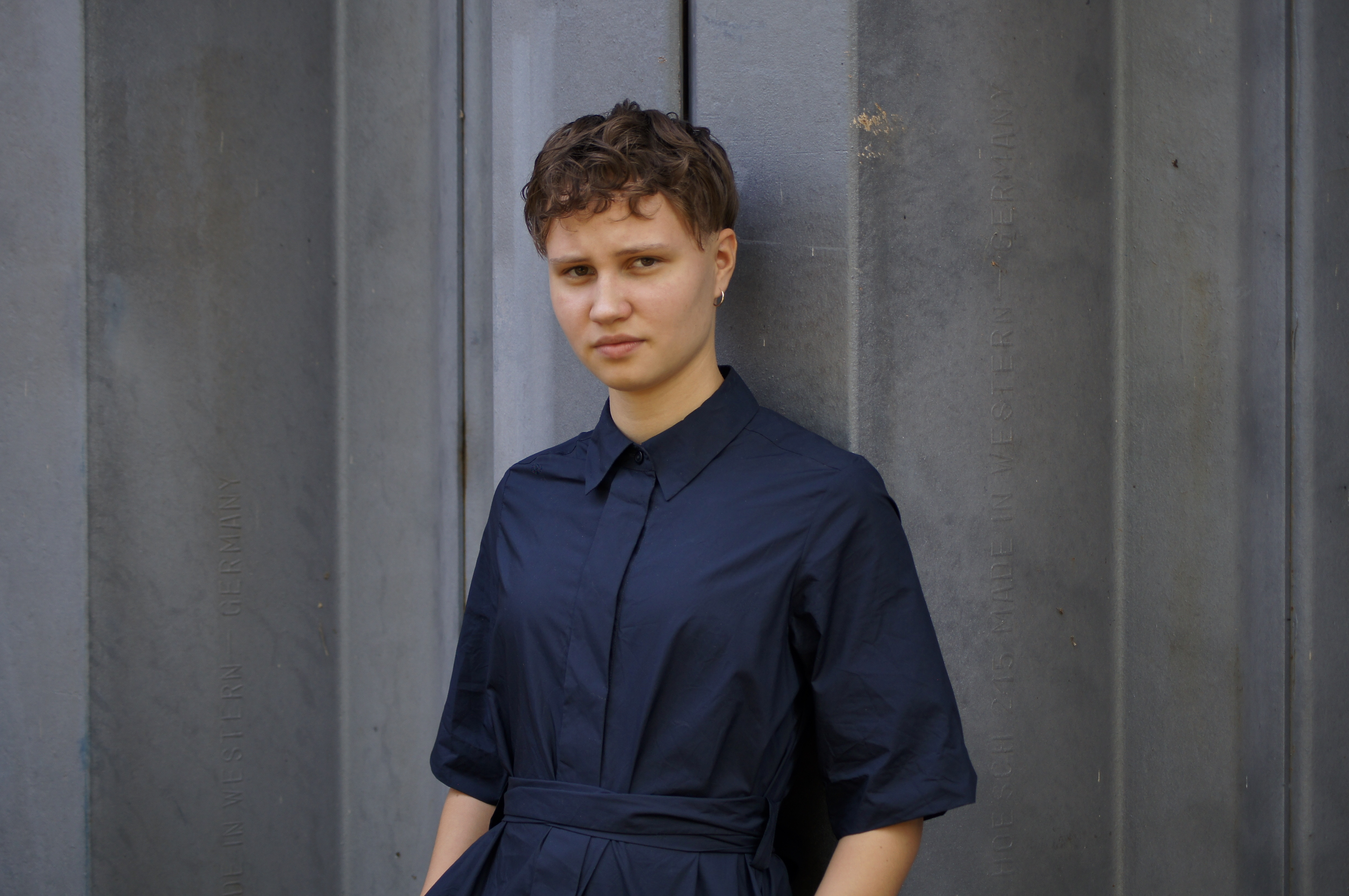 Luna Jordan (2019)